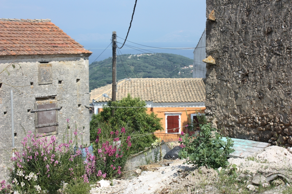 Häuser in Chlomos